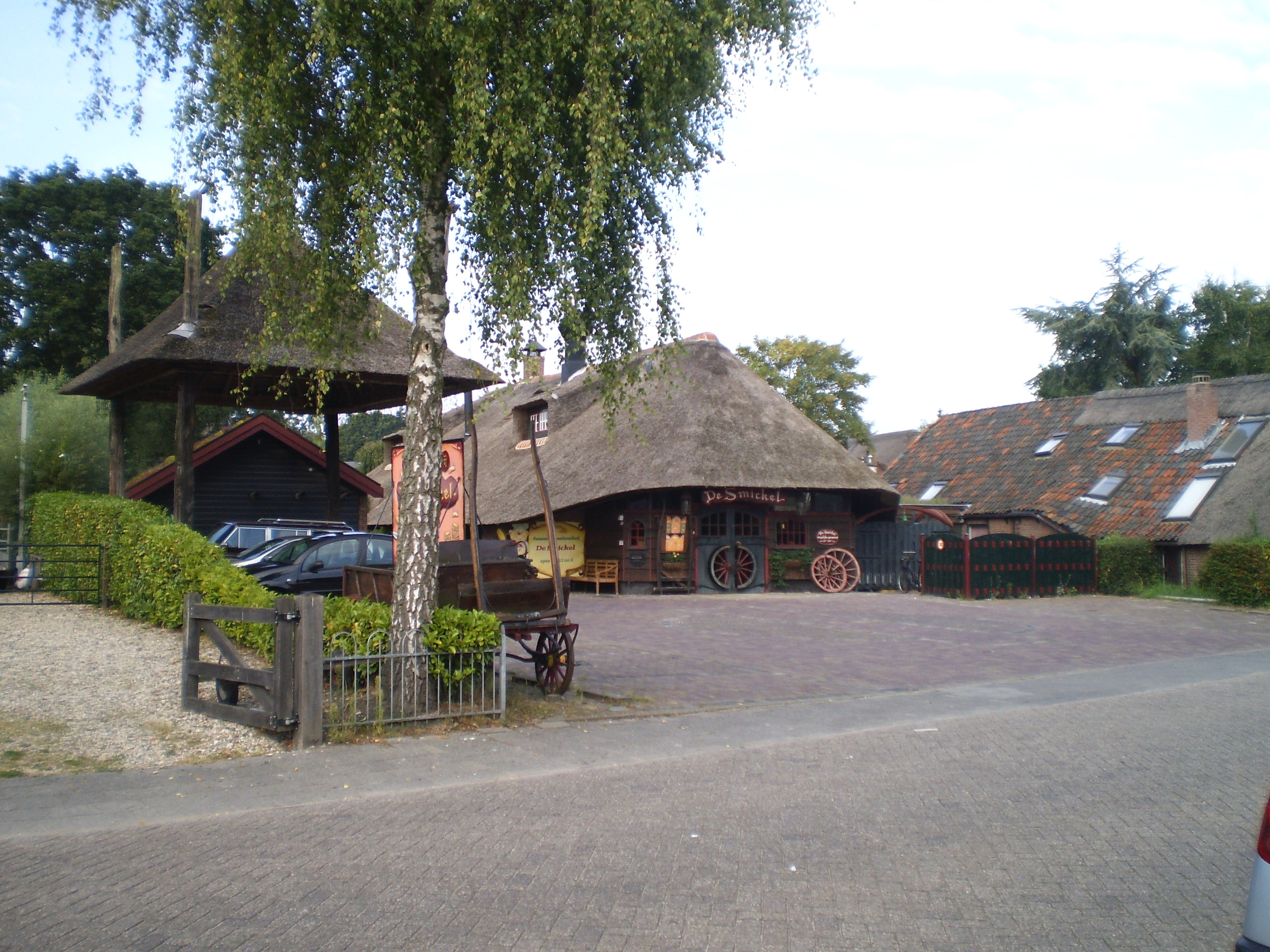 ôfbyld oanbean troch Swarte Kees op 18 augustus 2009